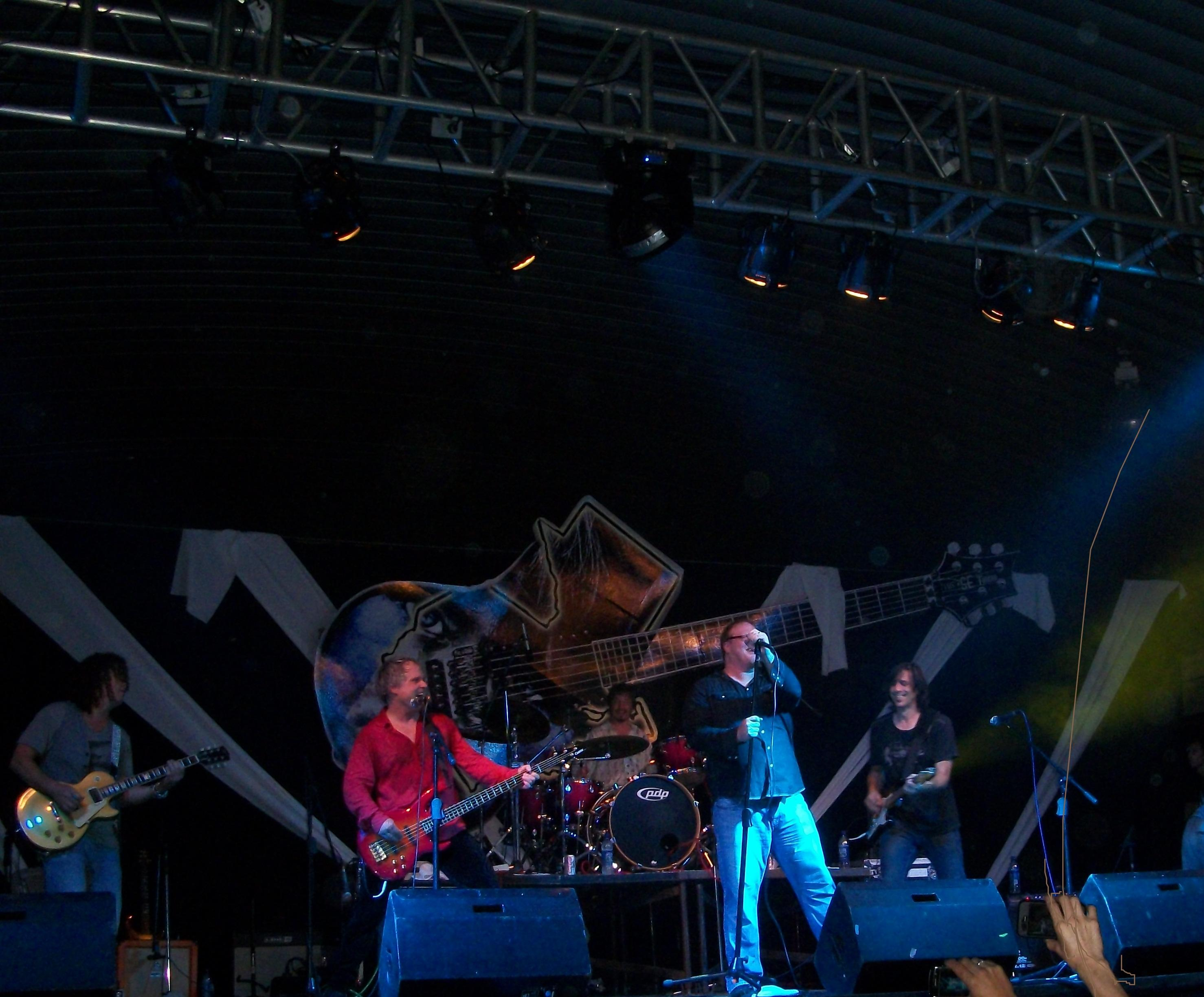 Guardian en Concierto Guatemala 31/07/2011